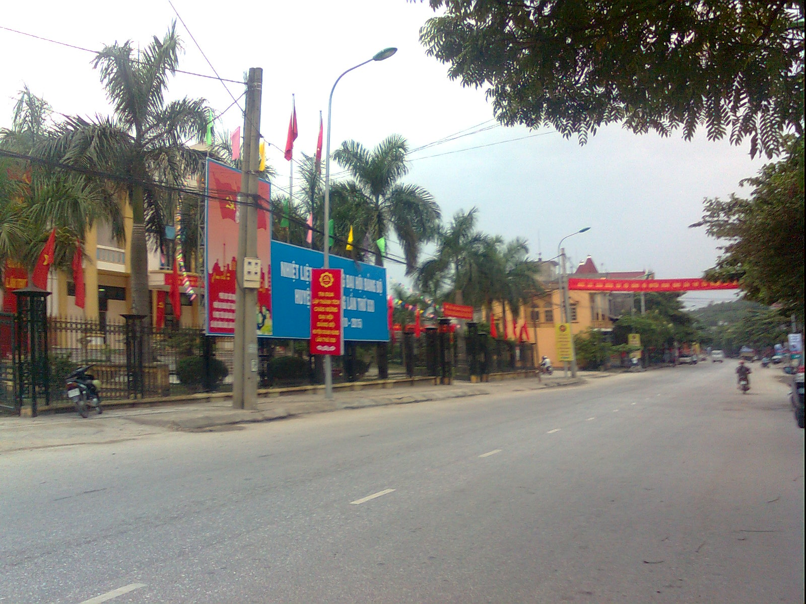 thi tran doan hung